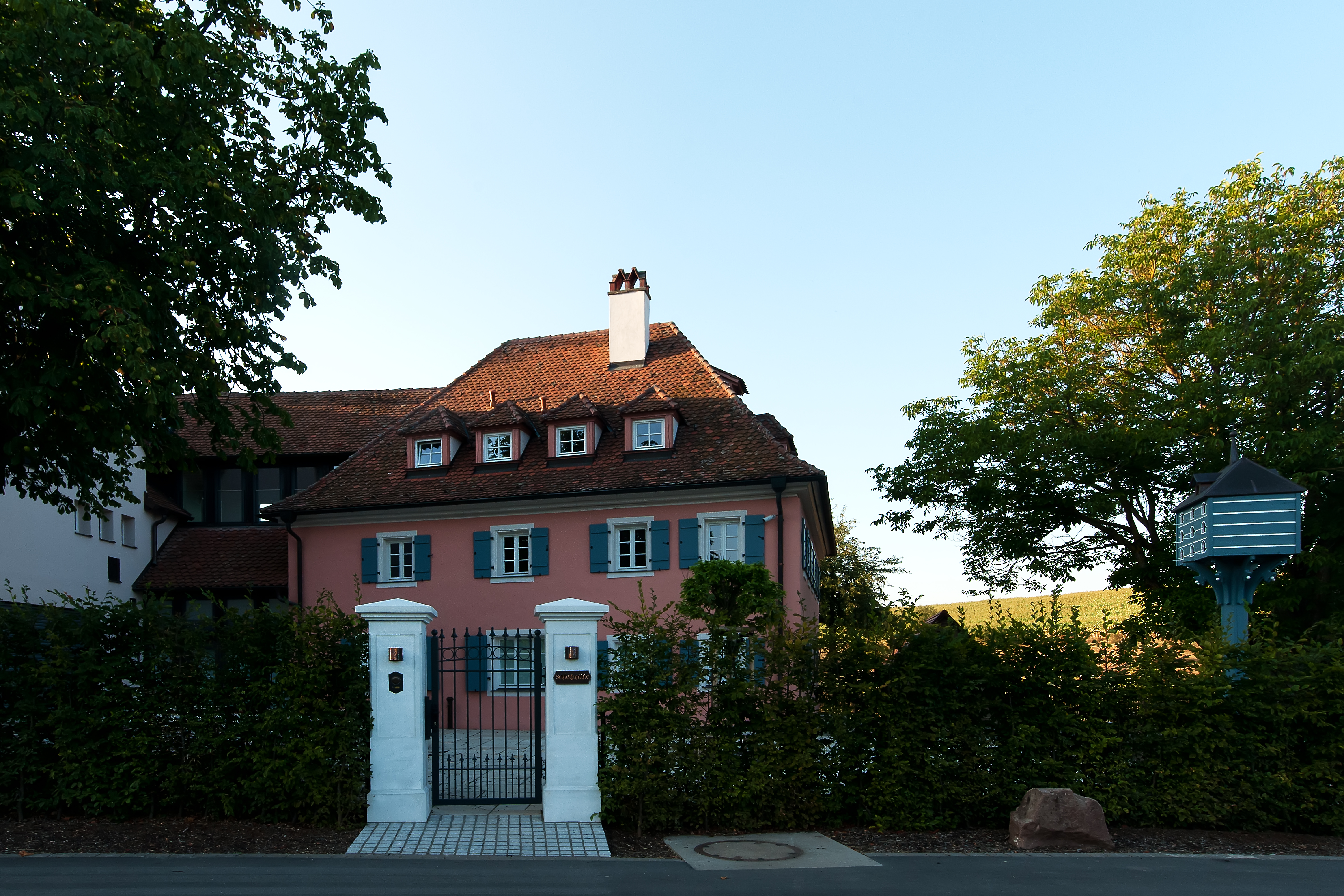 Schleifmühle Eingang, Rütteldorf, Cadolzburg This is a photograph of an architectural monument.